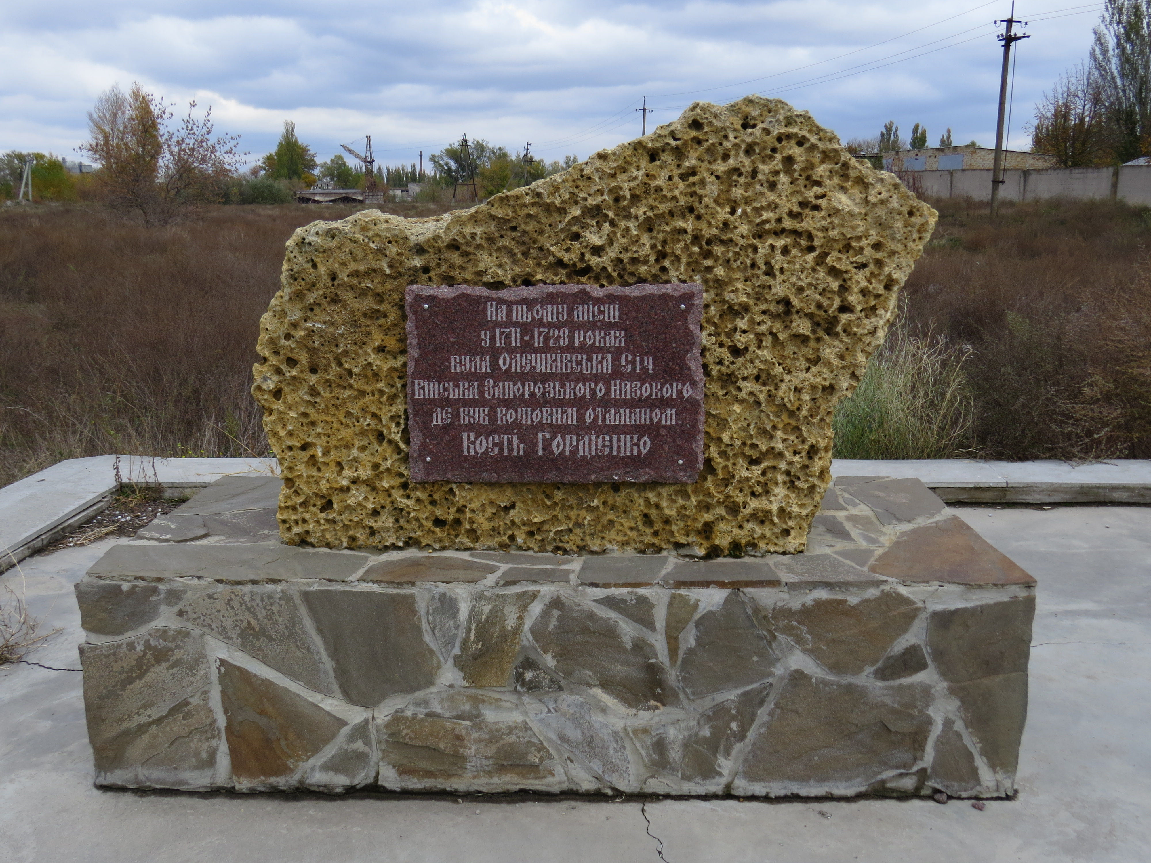 Олешківська Запорізька Січ, М. Цюрупинськ